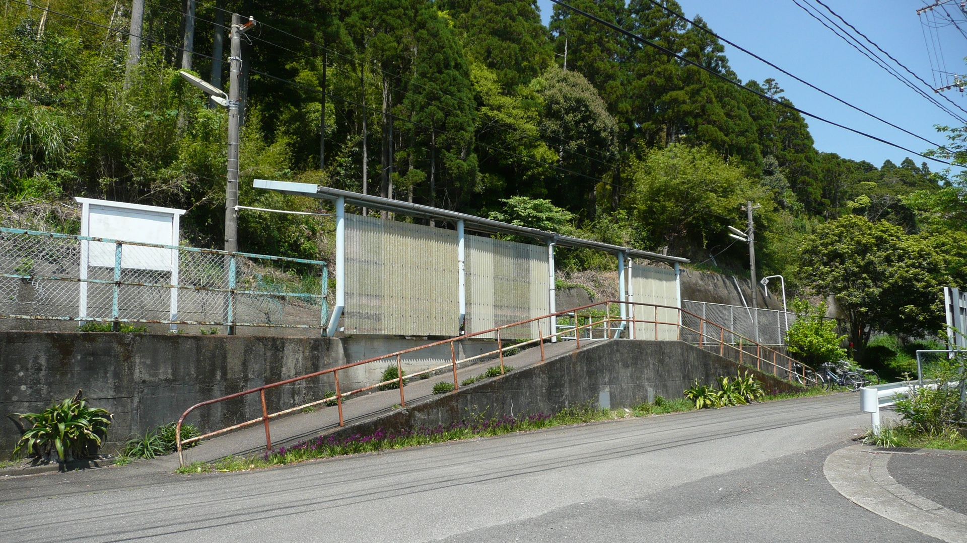 折生迫駅（日南線、日本）